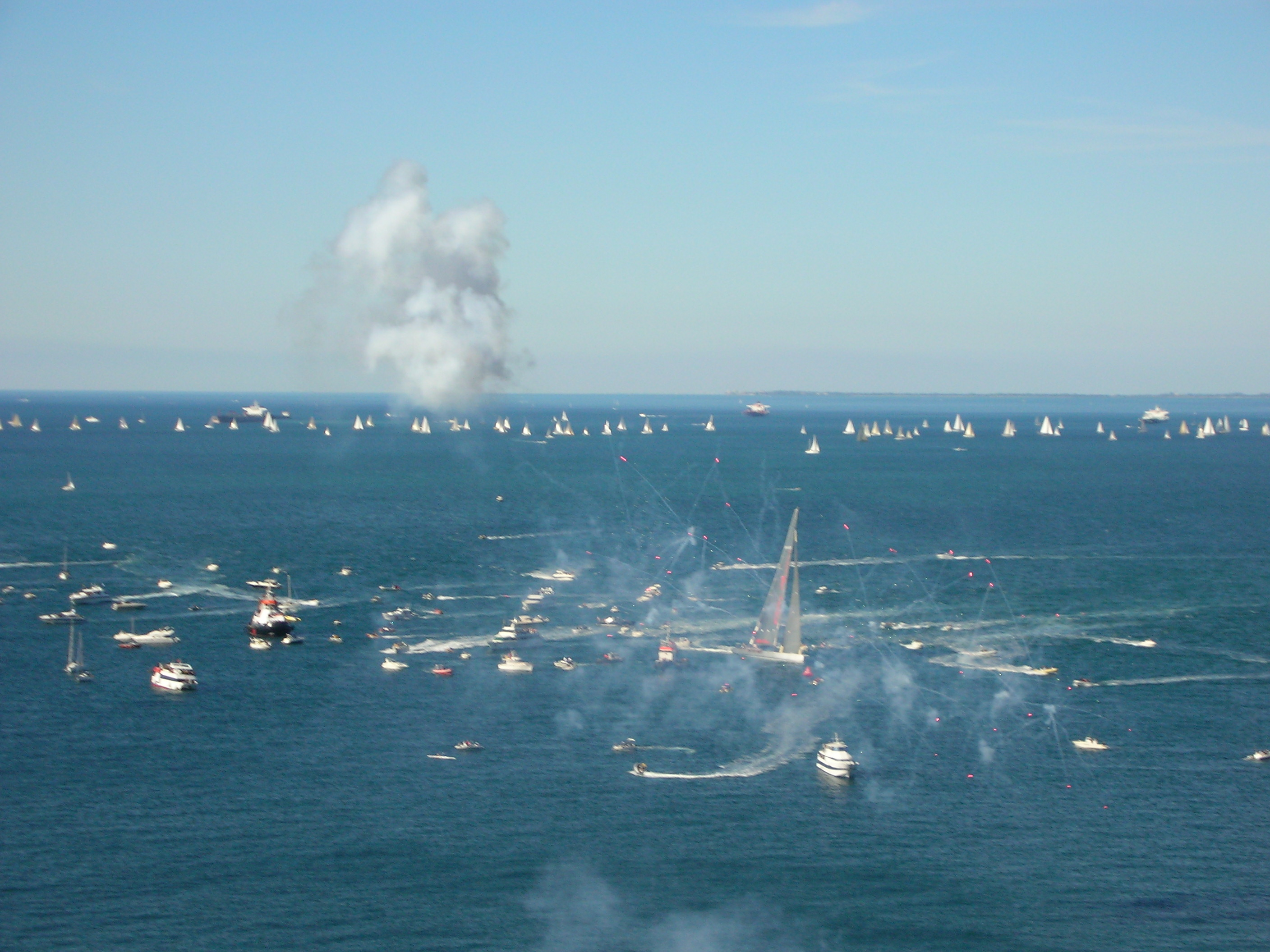 Arrivo della Barcolana 2006